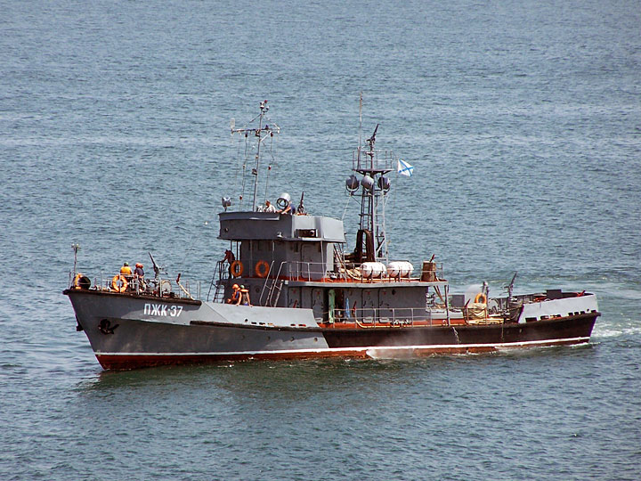 Противопожарный катер "ПЖК-37". Проект 364. Севастополь. Черноморский флот РФ.